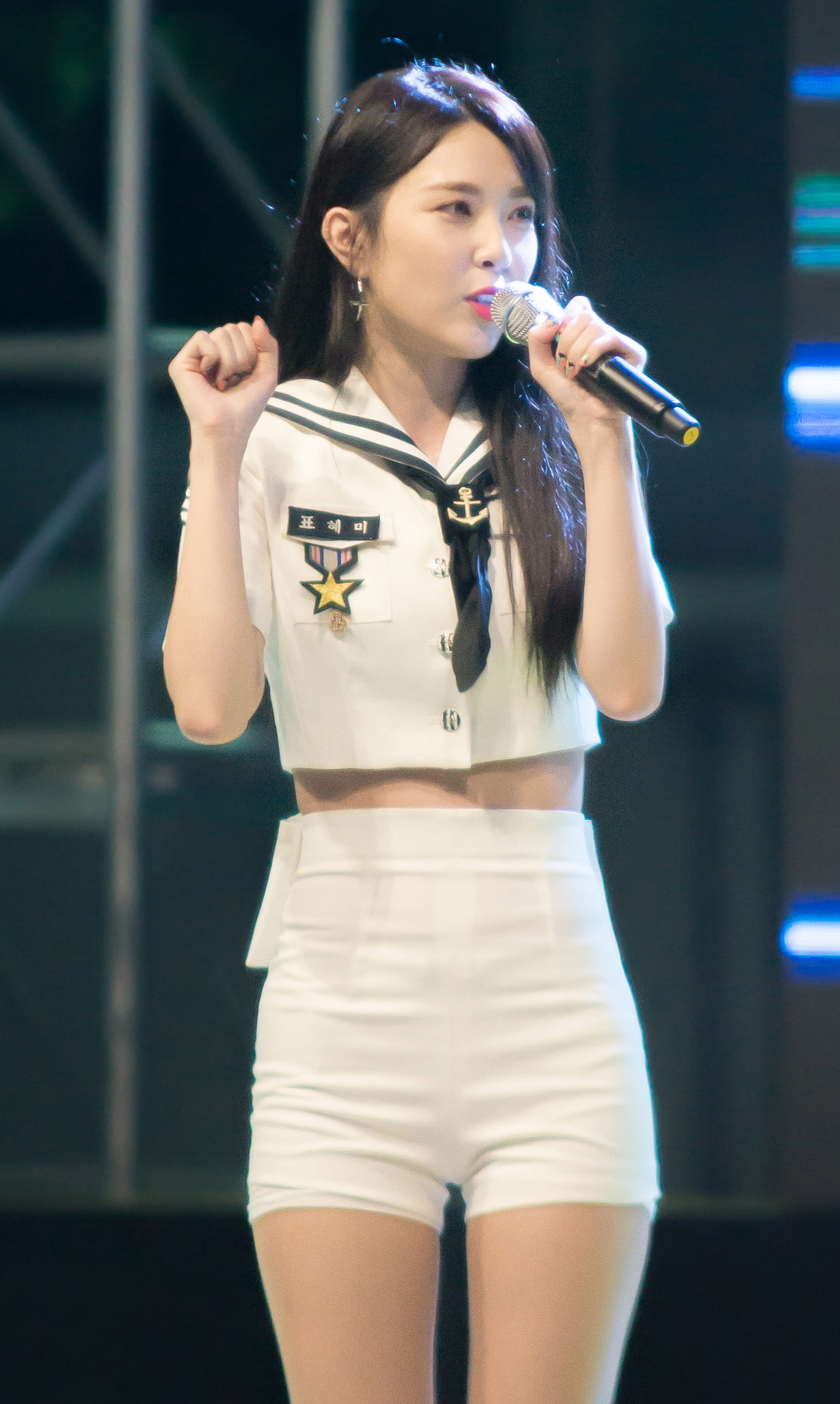 160908 순천향대학교 축제 - 나인뮤지스A